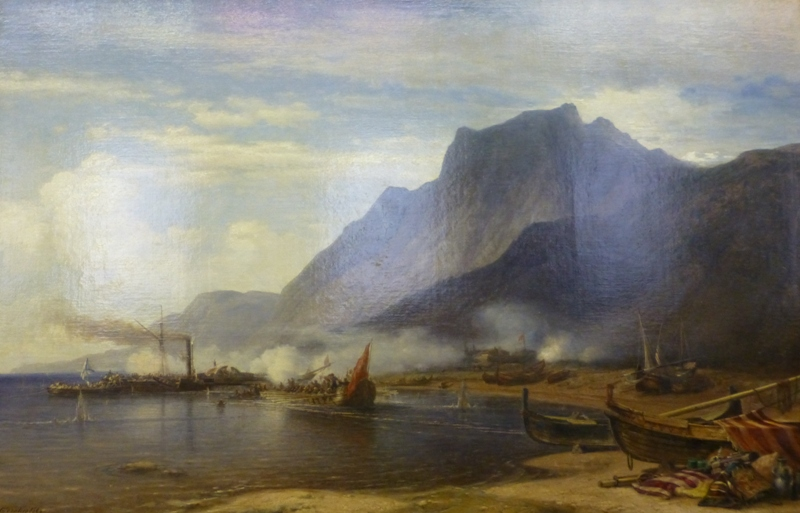 Бой пароходофрегата «Колхида» с турецкой береговой батареей на кавказском берегу 20 октября 1853 года.